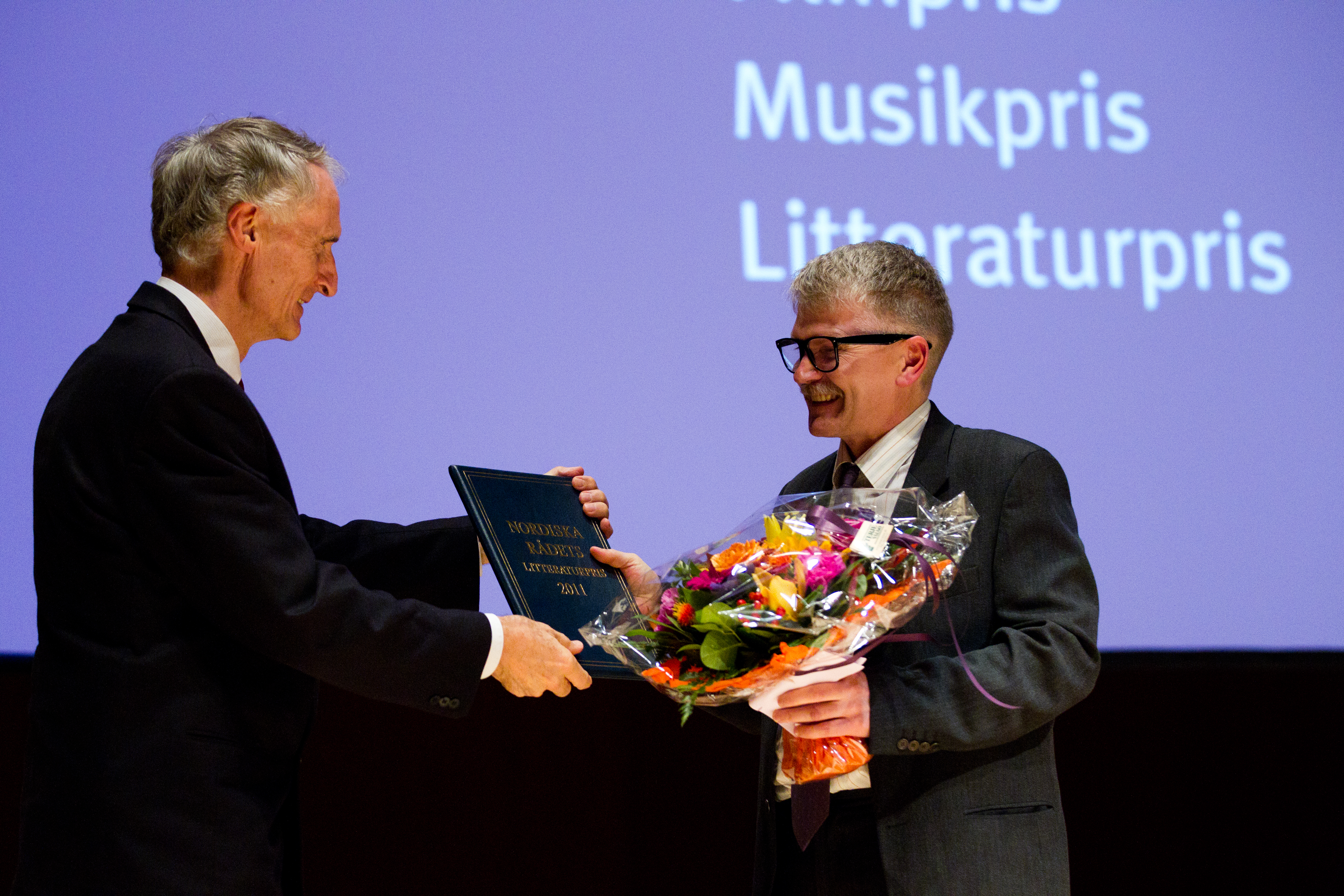 Författaren Gyrðir Elíasson mottar Nordiska Rådets litteraturprispris vid Nordiska Rådets session 2011 i Köpenhamn.